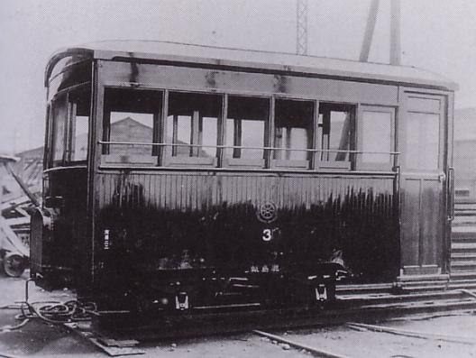 Gasoline railcar used in Kashima kido,"Ji3".